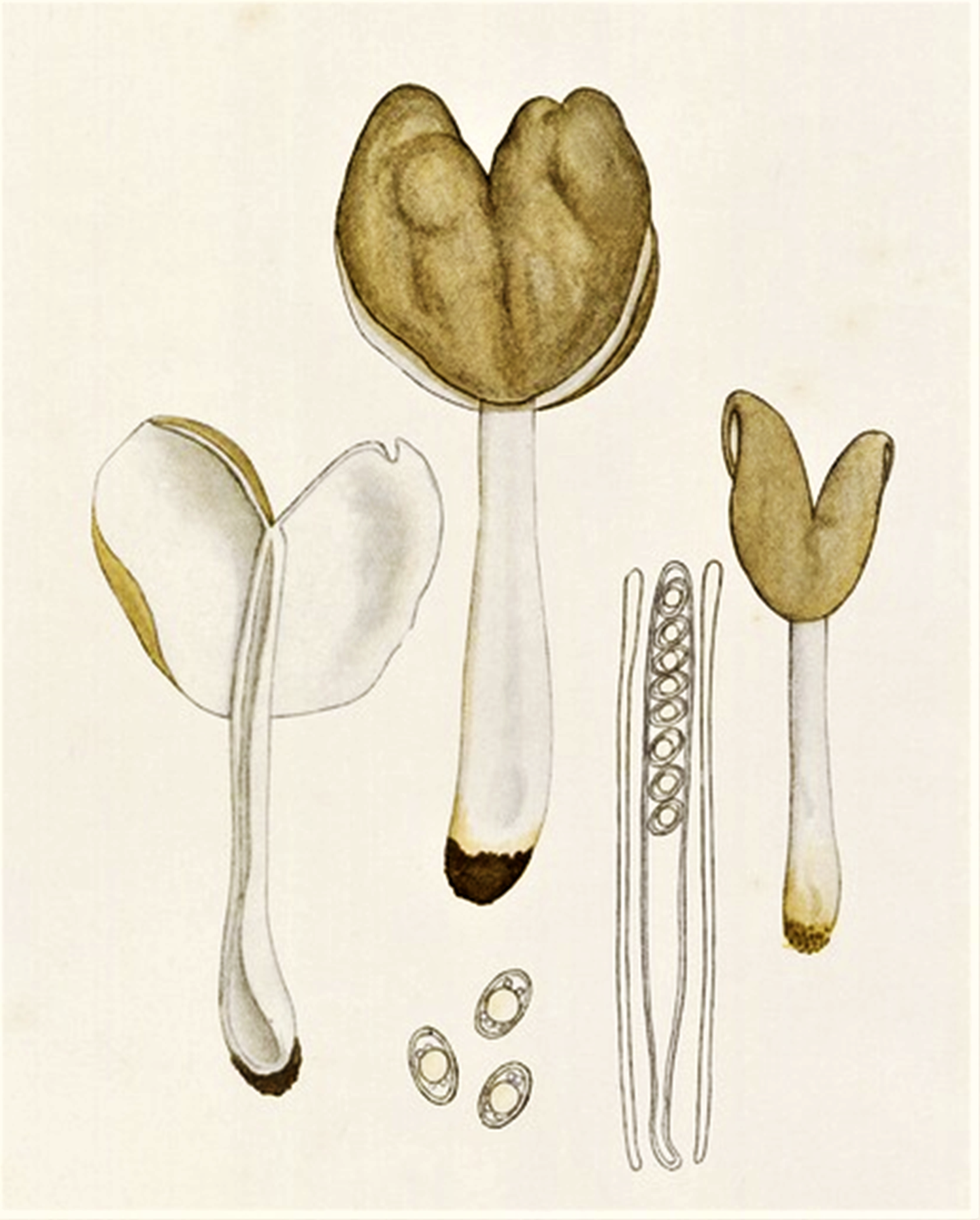 Giacomo Bresadola: Helvella elastica Bull. (1785)